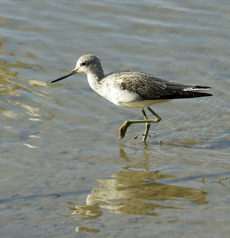 Tringa nebularia Albufera,Mallorca